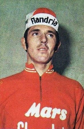 Roger De Vlaeminck en 1970 - Campioni dello Sport 1970-1971, n°160